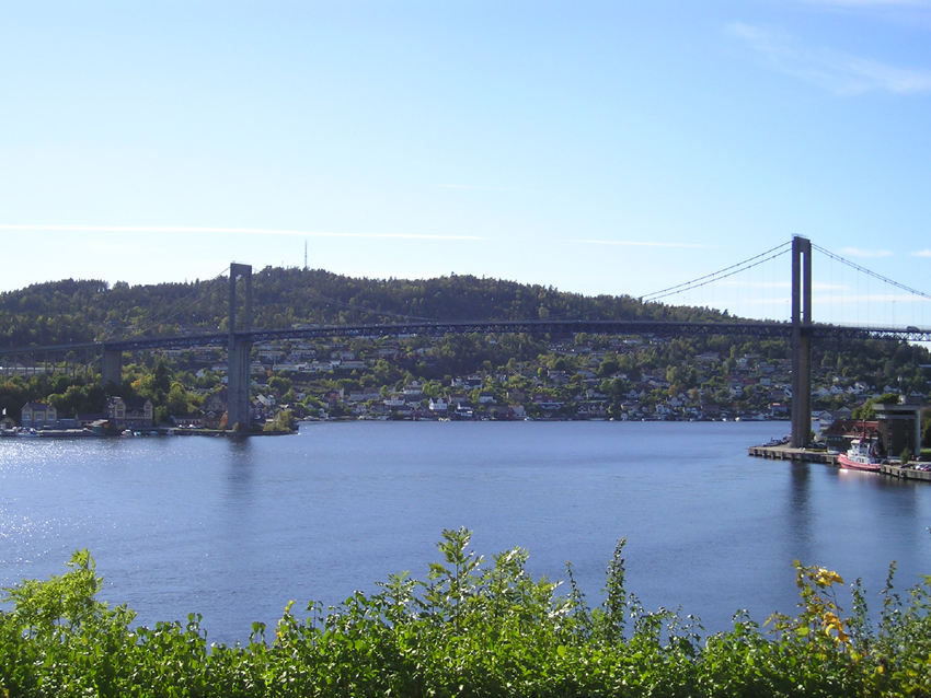 The "Brevik brigde", Porsgrunn, Norway.